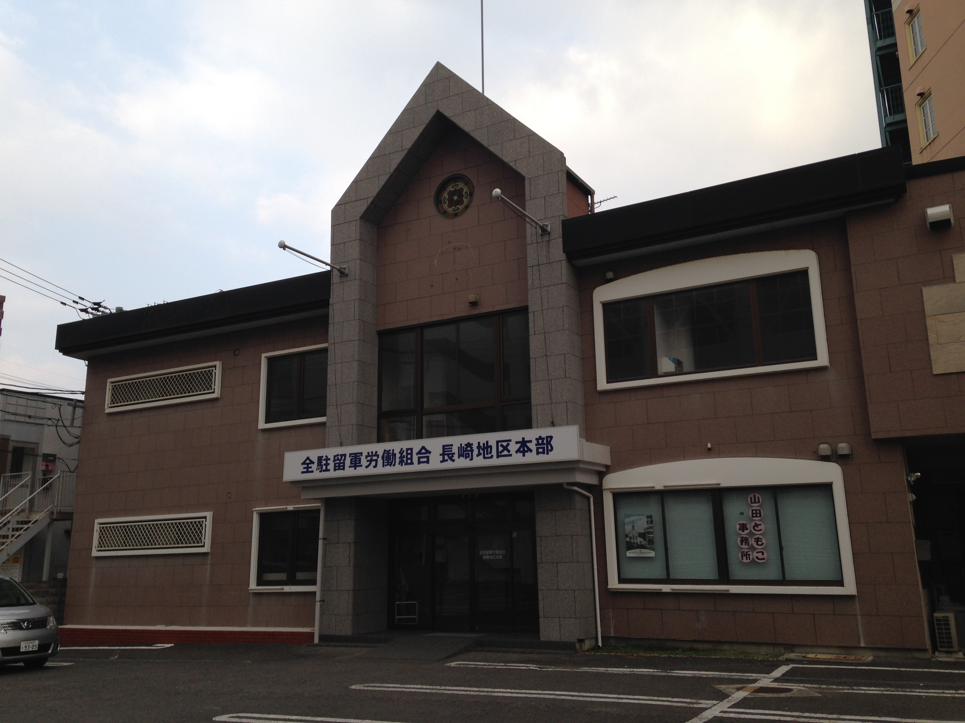 全駐留軍労働組合長崎地区本部